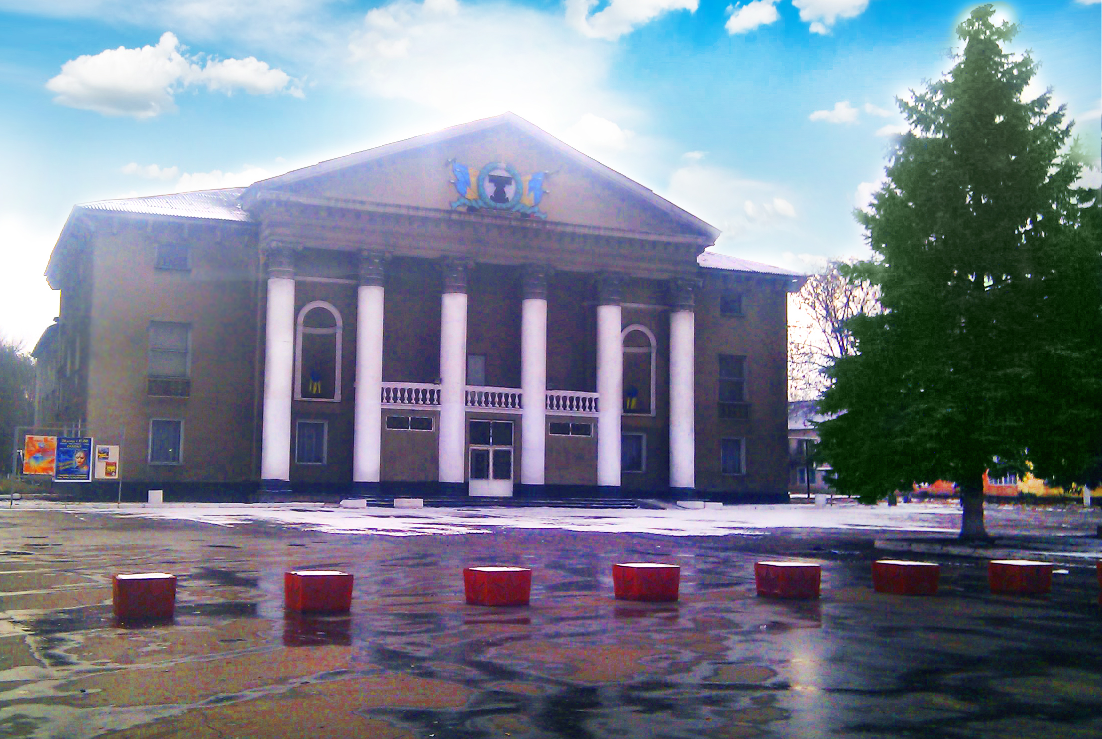 Донецкая область, город Белозёрское, Дворец Культуры